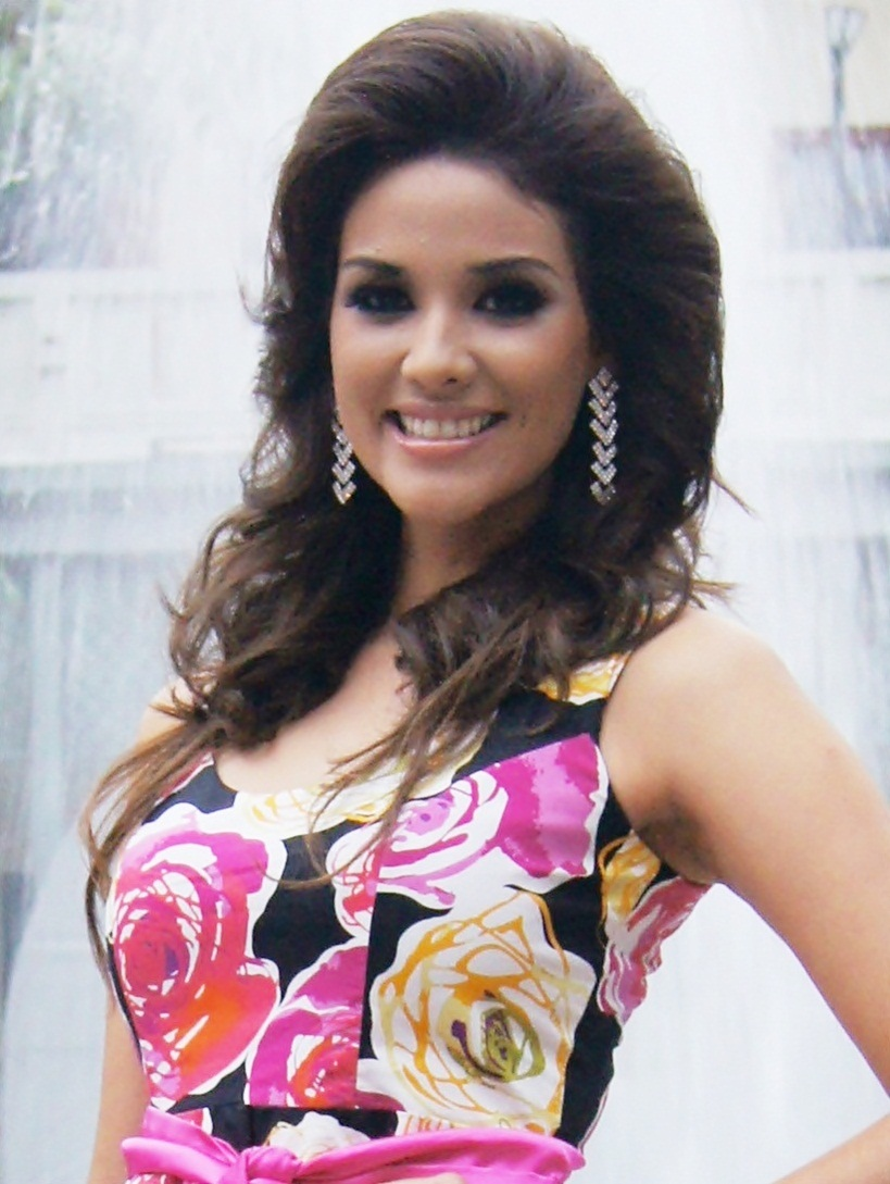 Nuestra Belleza El Salvador 2012.